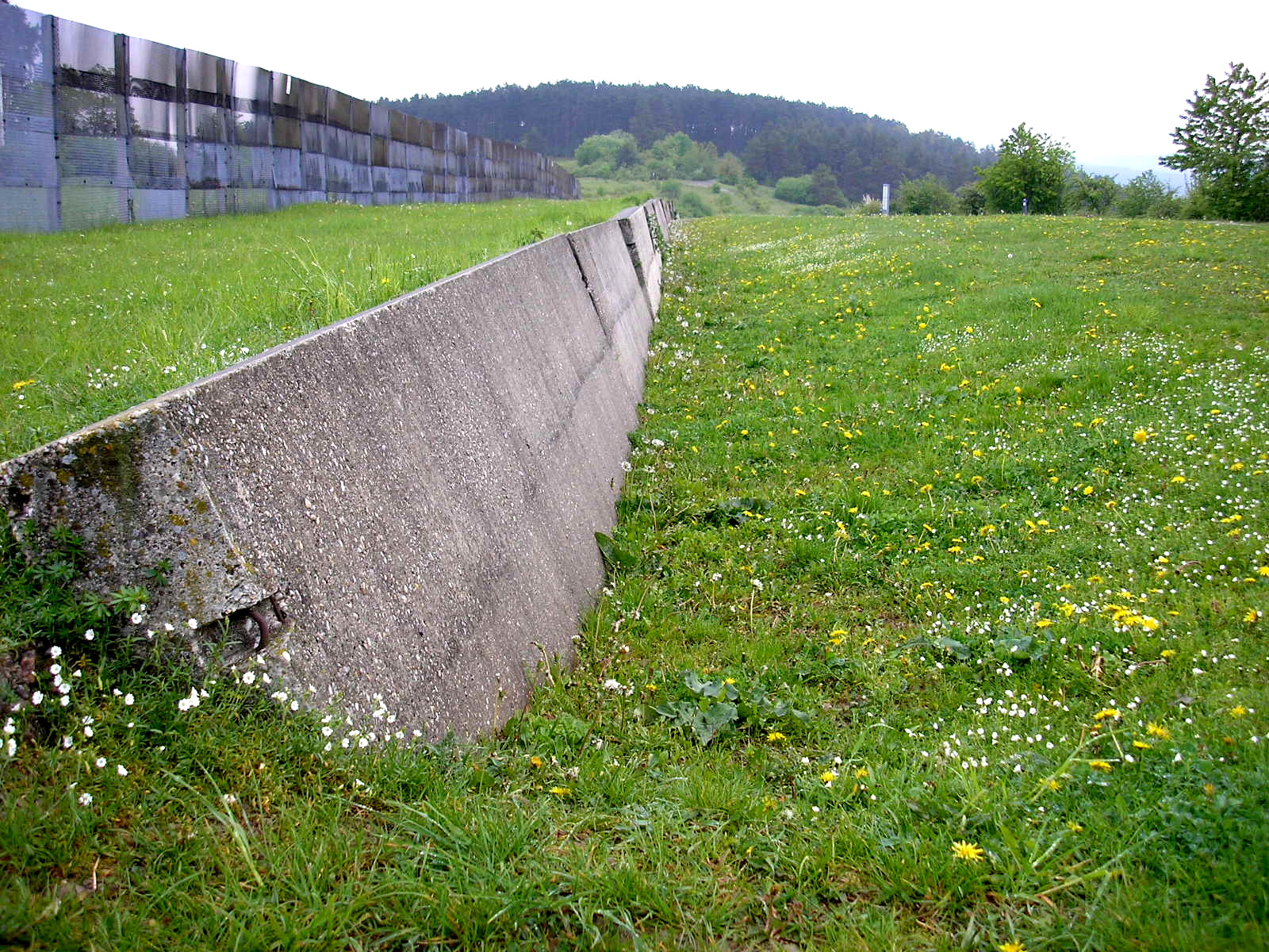 Teil der ehem. innerdeutschen Grenzanlagen am Point Alpha in der Rhön.